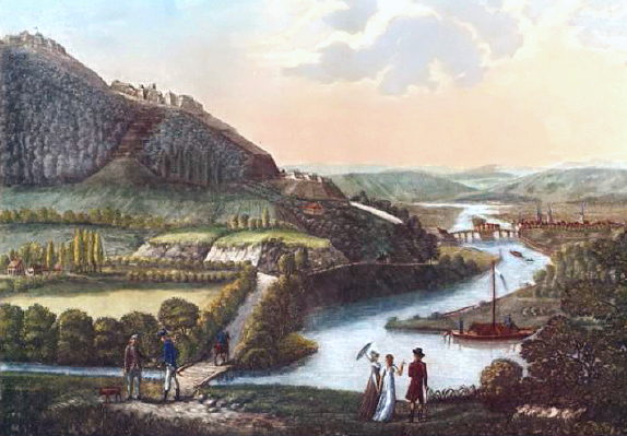 Der Klüt mit seinen drei Forts und der vierten Befestigungsanlage direkt am Weserufer, Blick von Süden